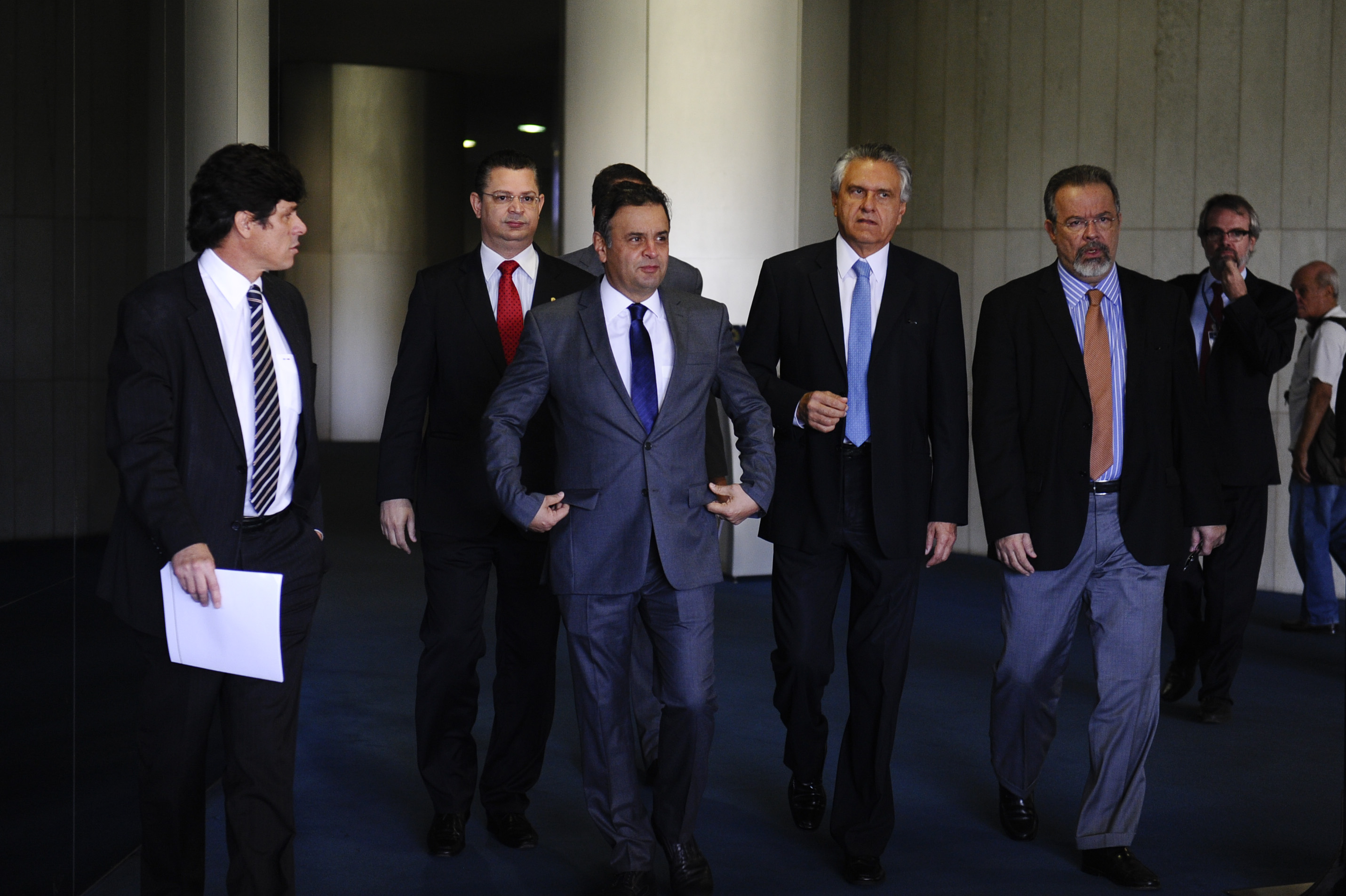 Comissão de senadores brasileiros que foi à Venezuela para tentar visitar presos políticos, se reúne na Liderança do PSDB. A comitiva pretendia visitar opositores ao governo venezuelano que se encontram presos na capital daquele país. Após horas aguardando uma solução diplomática, que lhes permitiria levar a missão até o fim, o grupo decidiu retornar a Brasília. Participam: senador Aécio Neves (PSDB-MG); senador Ronaldo Caiado (DEM-GO) Fotos: Marcos Oliveira/Agência Senado